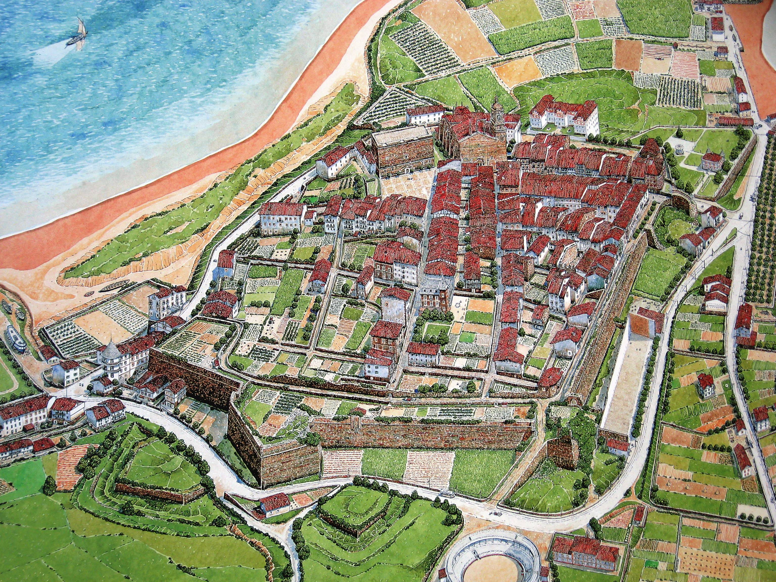 Karte von Hondarribia, frühe Neuzeit, Infotafel auf dem Marktplatz